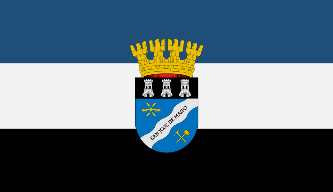 Bandera de la comuna de San José de Maipo